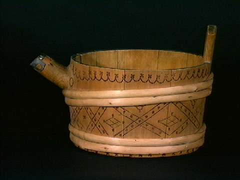 Trøysask med svidekor fra Hol i Hallingdal. Høyde 23 cm. Norsk_Folkemuseum_NF.1914-0363